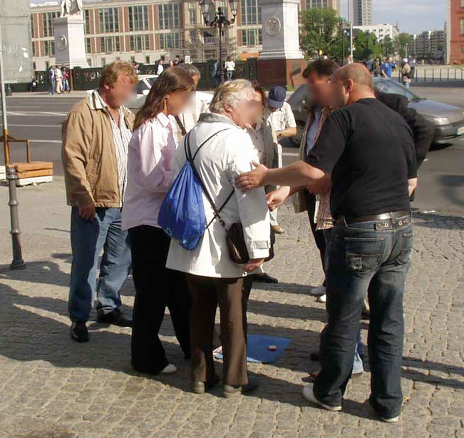 Autor: Ralf Roletschek